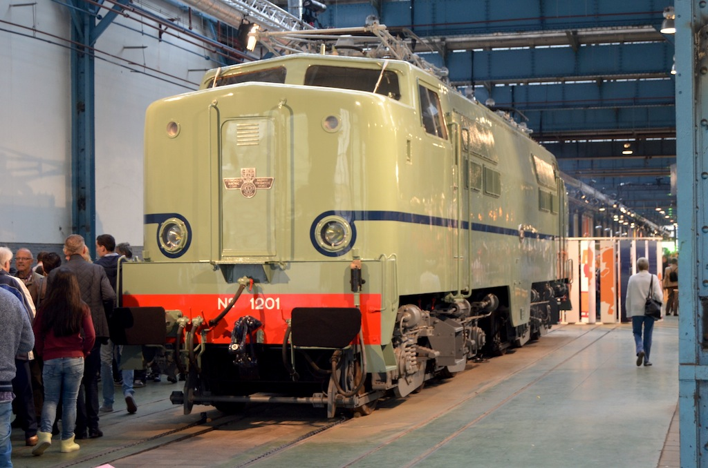 Spoorparade Amersfoort; loc 1201 in het Turkoois. Foto: Erik Swierstra.